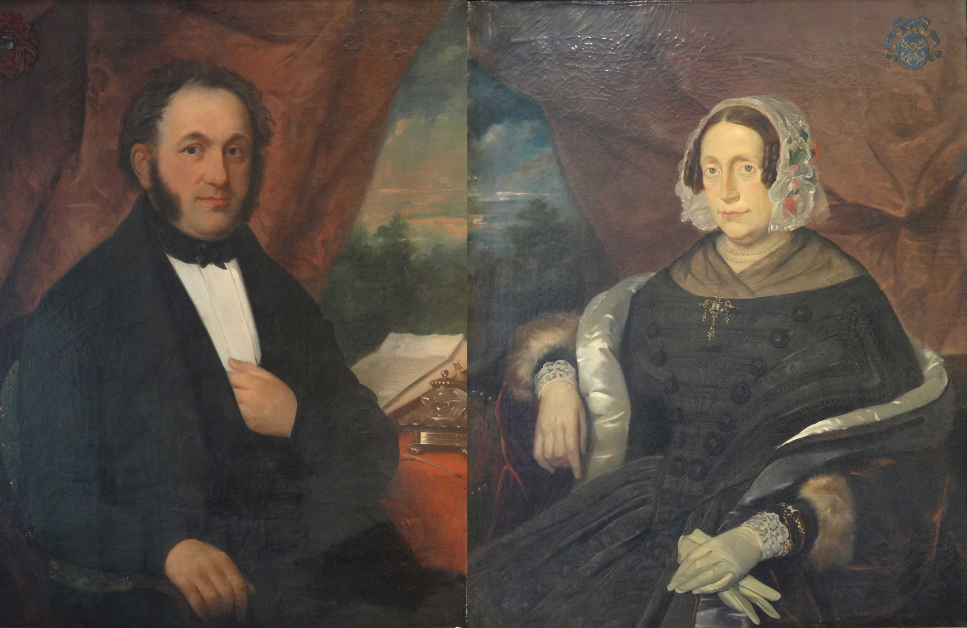 Nicolaas IJzendoorn (1793-1867) burgemeester van Gouda en zijn tweede echtgenote Antonia Maria Imans (1798-1865) geschilderd door Petrus Theodorus van Wijngaerdt (1816-1893)